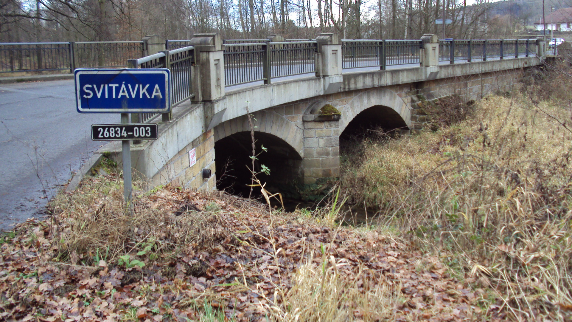 Silniční most přes Svitávku, okraj Zákup směrem na Kamenici